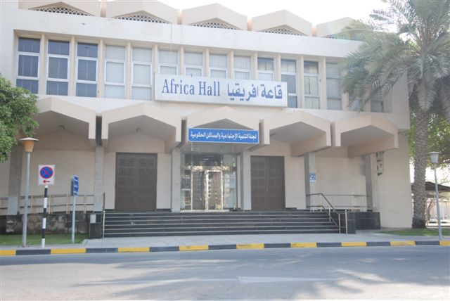 صورة حديثة لقاعة أفريقيا في الشارقة وتظهر أسفل منها قاعة لجنة الإسكان الجديدة